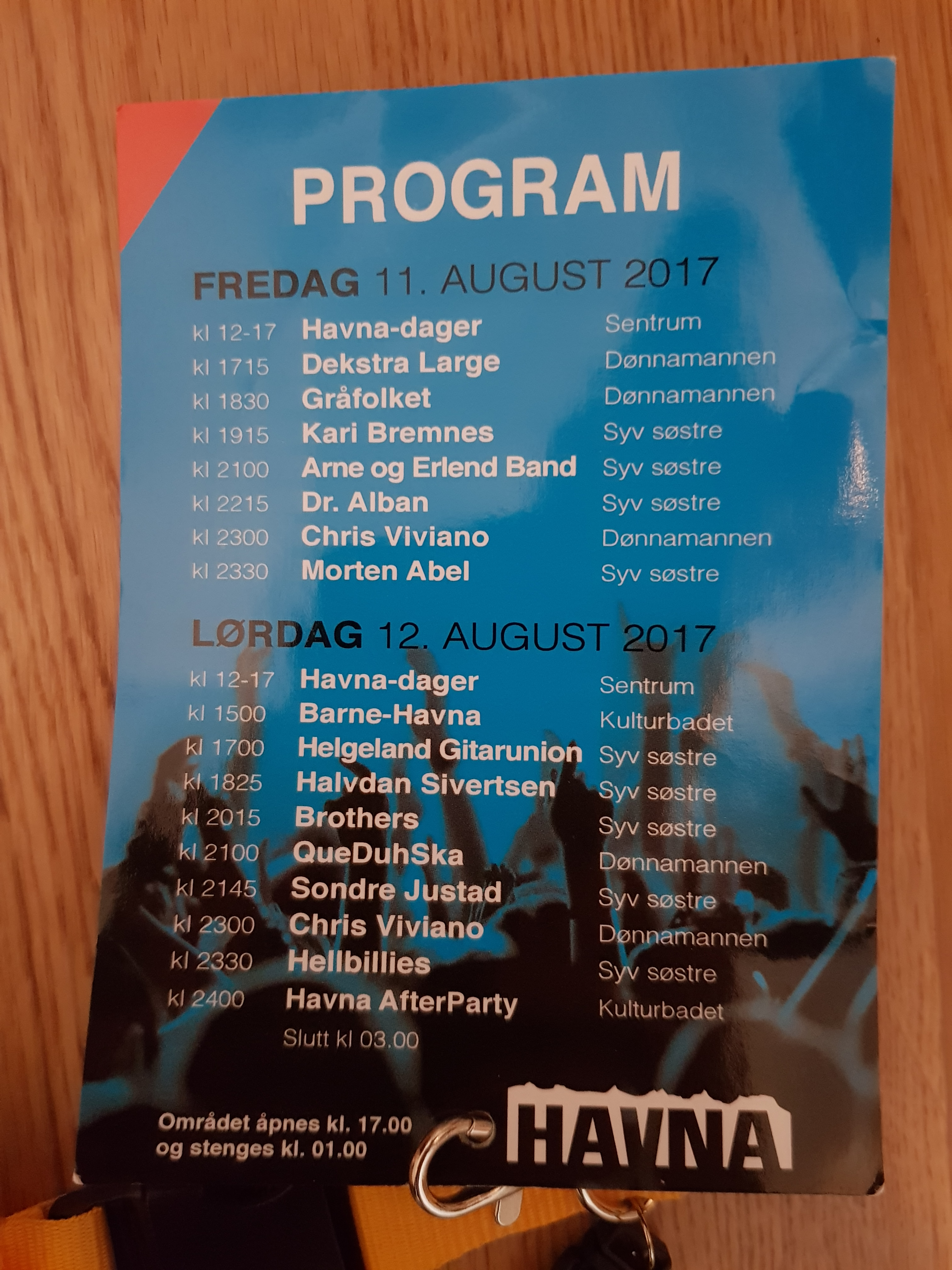 Festivalprogram for Havnafestivalen 2017